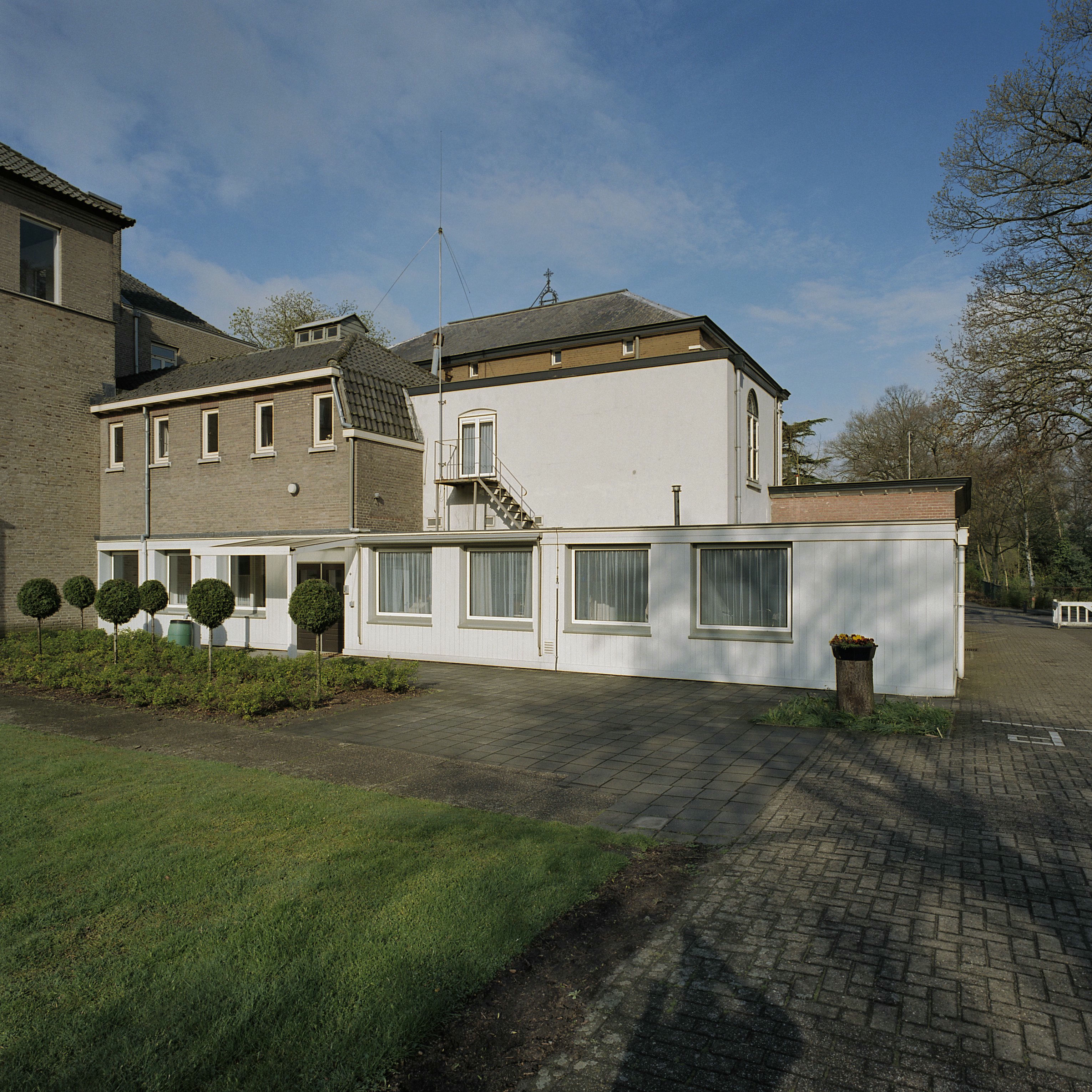 Villa En Klooster Van De Missiezusters Franciscanessen Van De He: Overzicht achtergevel villa